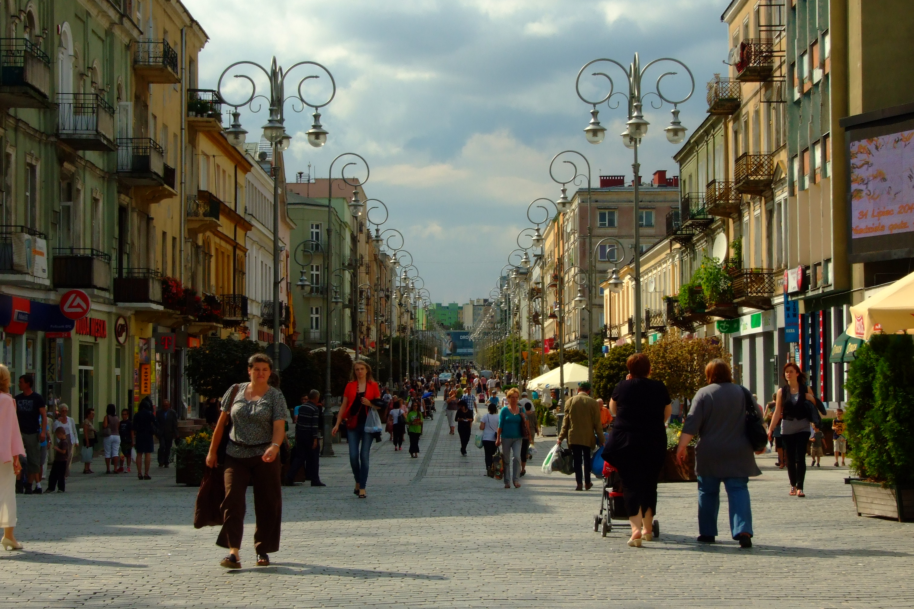 Kielce - ul. Sienkiewicza - widok od mostu nad Silnicą w kierunku dworca PKP (błędna nazwa pliku)